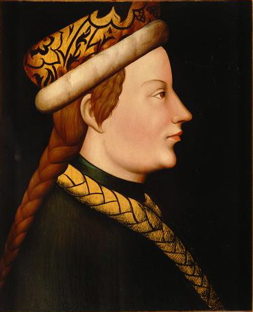 Herzog Albrecht III. (1349/50-1395), Sohn d. Albrecht II. von Habsburg, Profilbildnis mit dem Zopforden nach einem verlorenen Original